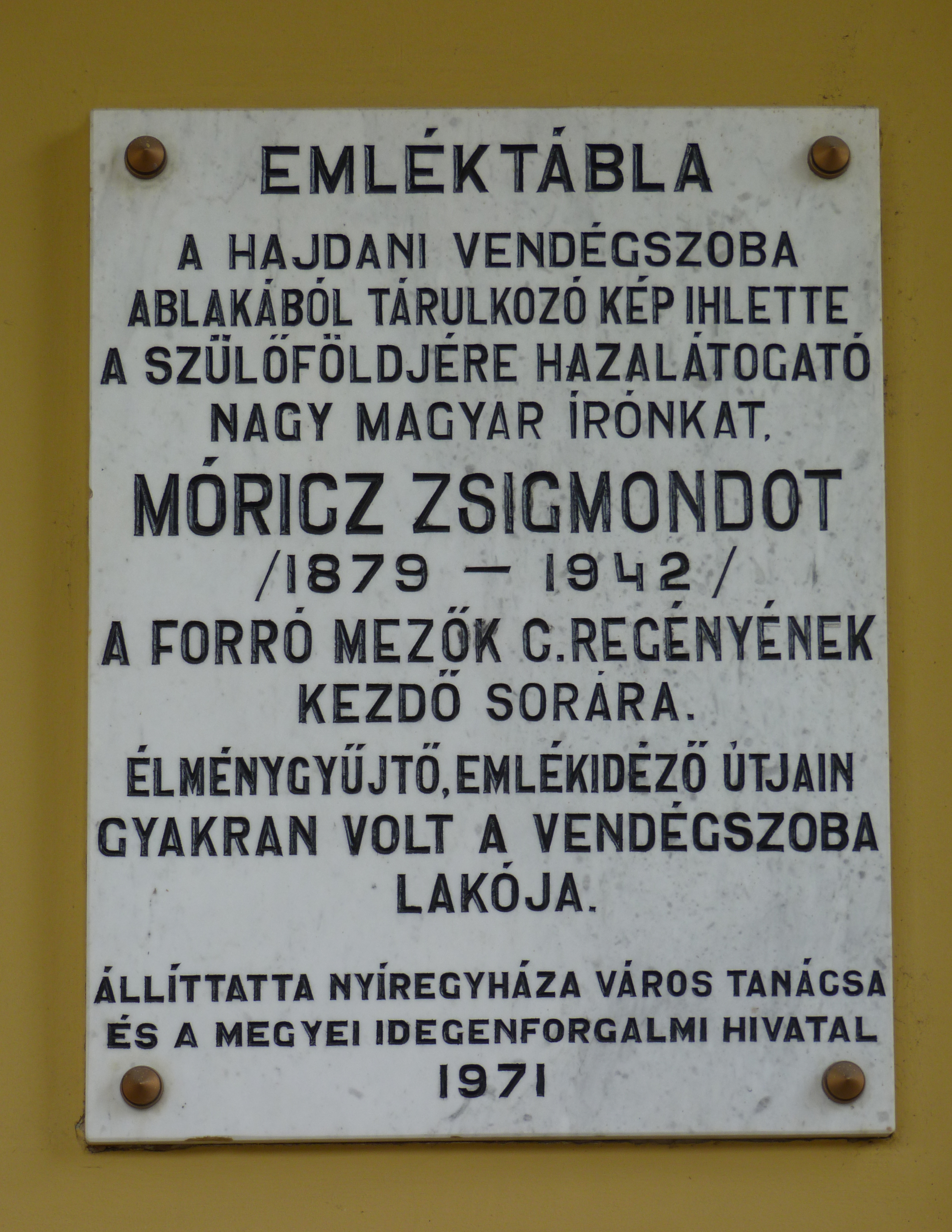 A felvétel 2013. Május 17 –én pénteken készült Nyíregyházán. ©© Derzsi Elekes Andor, Budapest, 2013, A kép és filmfelvételek egészben, vagy részletekben másolását, bármilyen úton történő sokszorosítását és felhasználását a szerző ellenérték nélkül, jogutódjaira is kihatóan megengedi. Az engedély kiterjed a kereskedelmi célú hasznosításra is. Kéri azonban nevének feltüntetését a felhasználás során. A Metapolisz sorozat valamennyi képe és filmje Creative Commons alatti valamint kereskedelmi - for profit - célra is felhasználható. Ajánlott hivatkozás: Derzsi Elekes Andor: Metapolisz DVD line